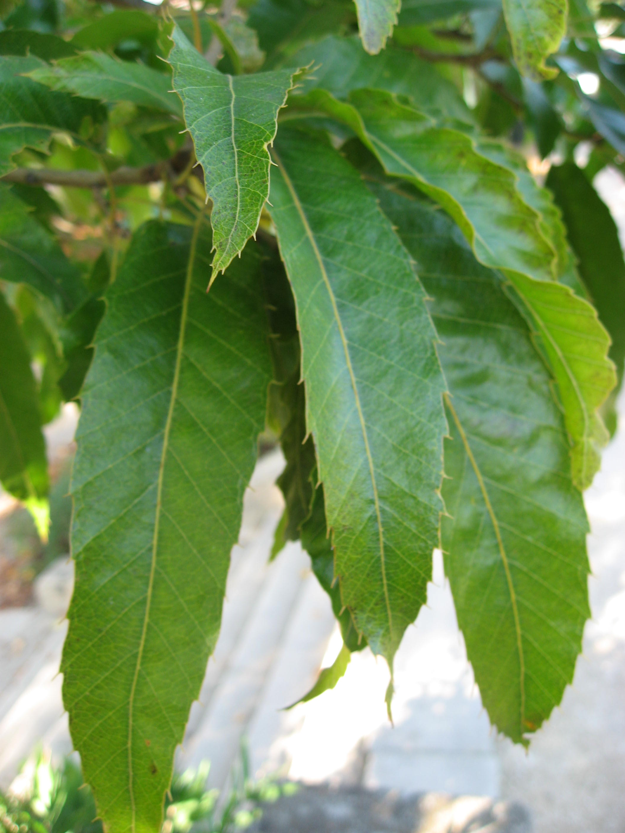 Quercus acutissima in Serres d'Auteuil Map: 48° 50' 49" N 2° 15' 8" E